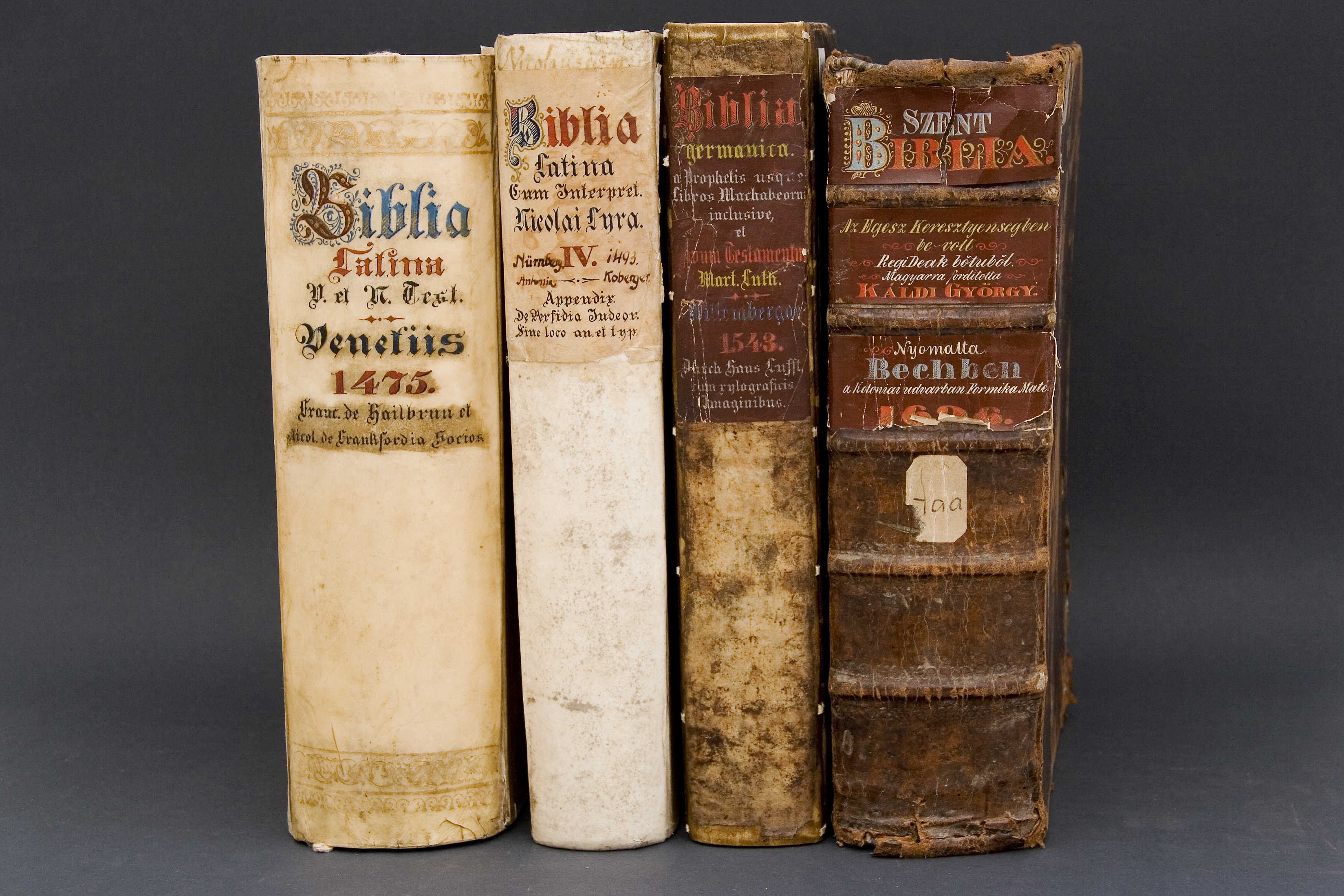 Szammer-kötések